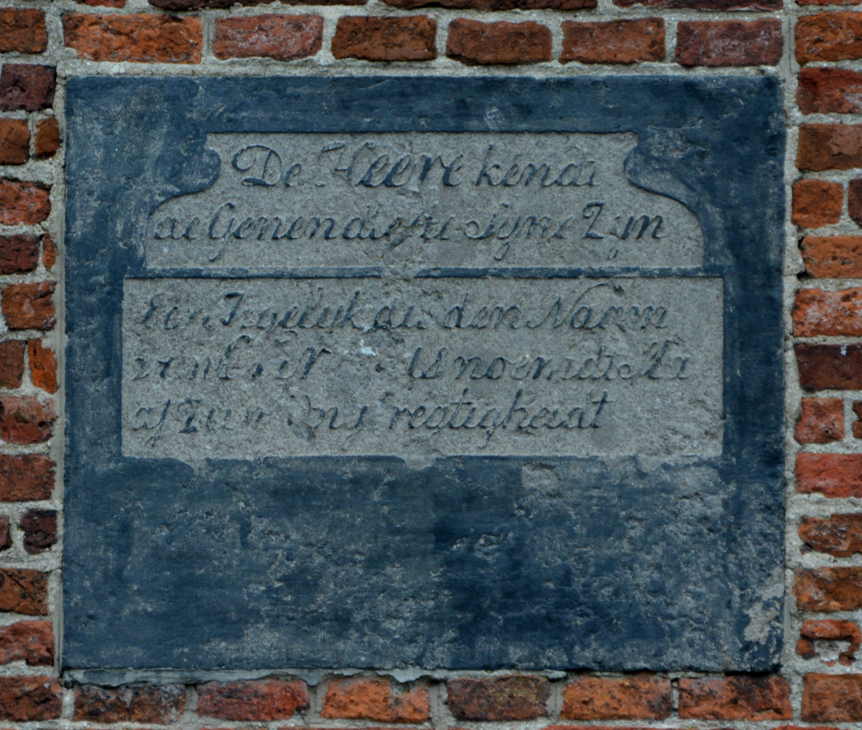 Kerk van Wijnjeterp, gevelsteen